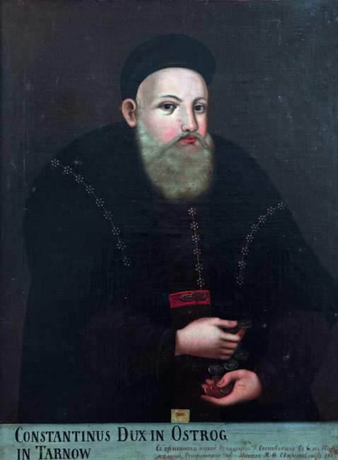 Беларуская (тарашкевіца): Партрэт Канстантына Васіля Астроскага (Kanstantyn Vasil Astroski)